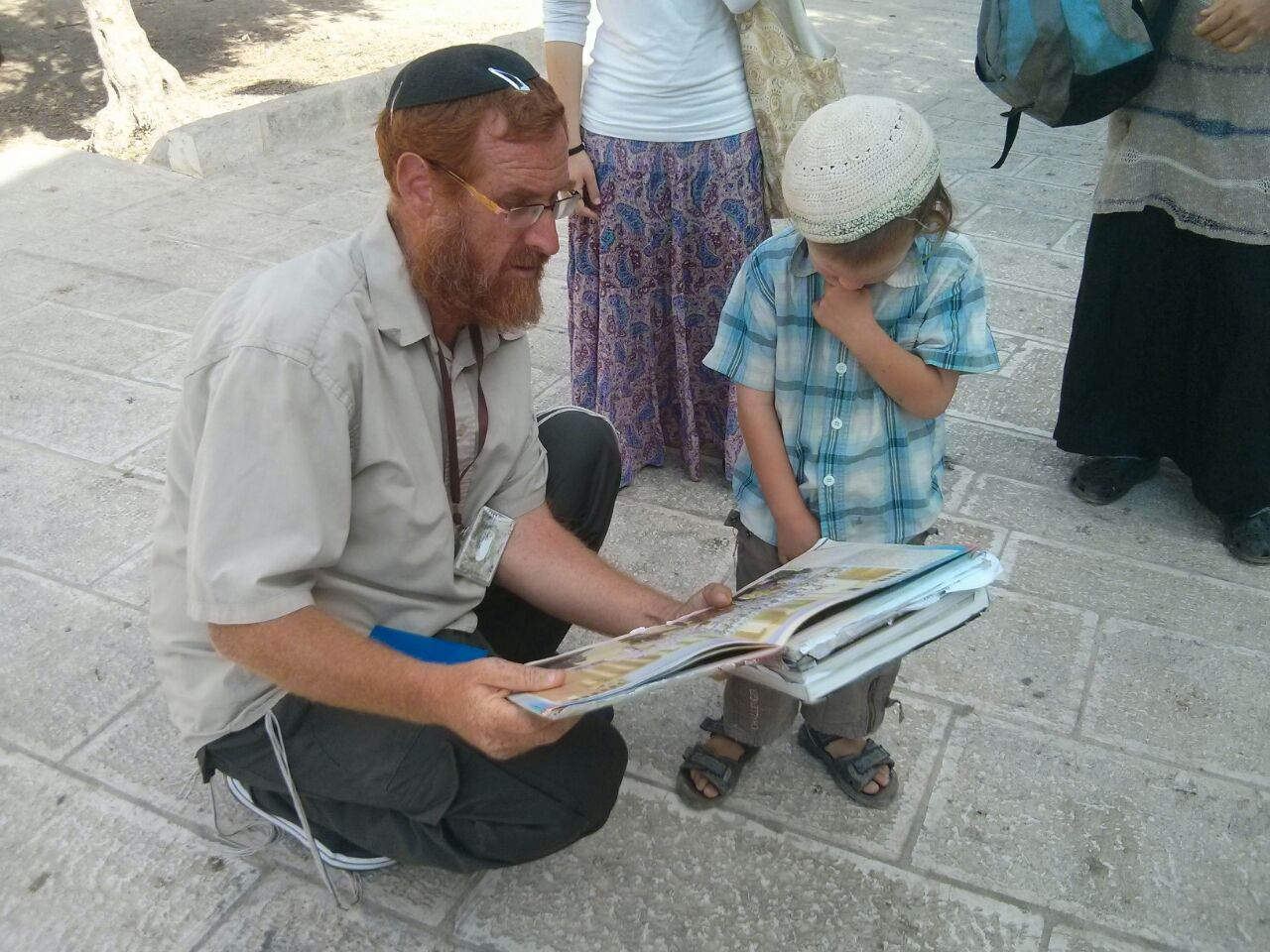 יהודה גליק בעת הדרכה בהר הבית